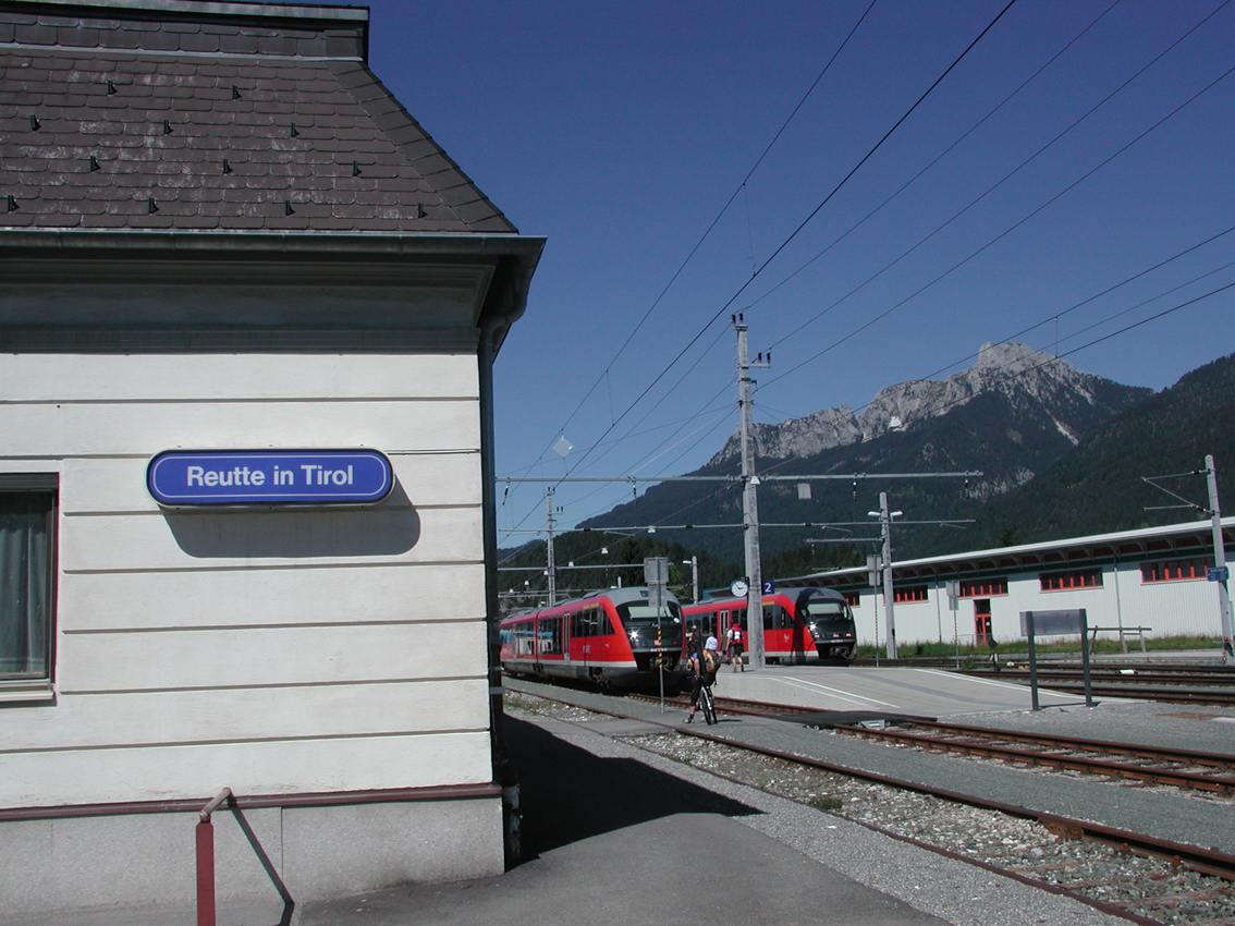 Bahnhof Reutte Tirol, Österreich.